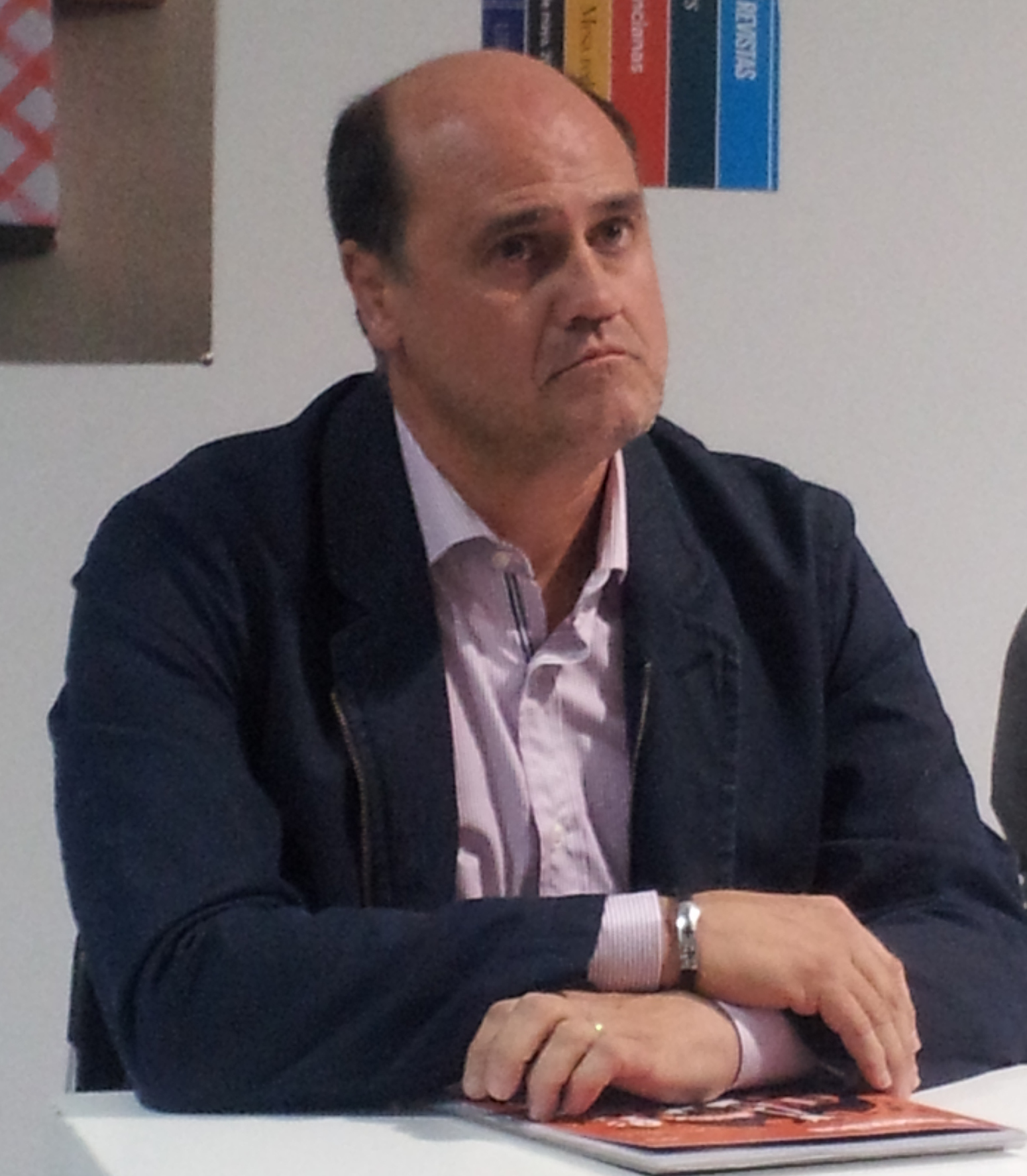 El "Catedràtic" Fernando a la presentació del número 49 de Panenka.